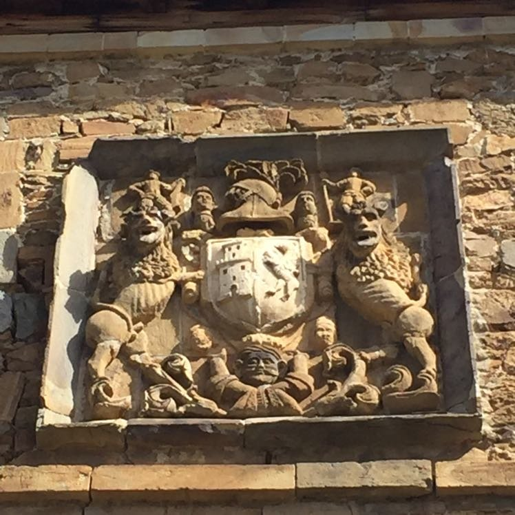 Escudu d'armes de los Faes, nel Palaciu de los Faes-Miranda, Carabanzo Ḷḷena.